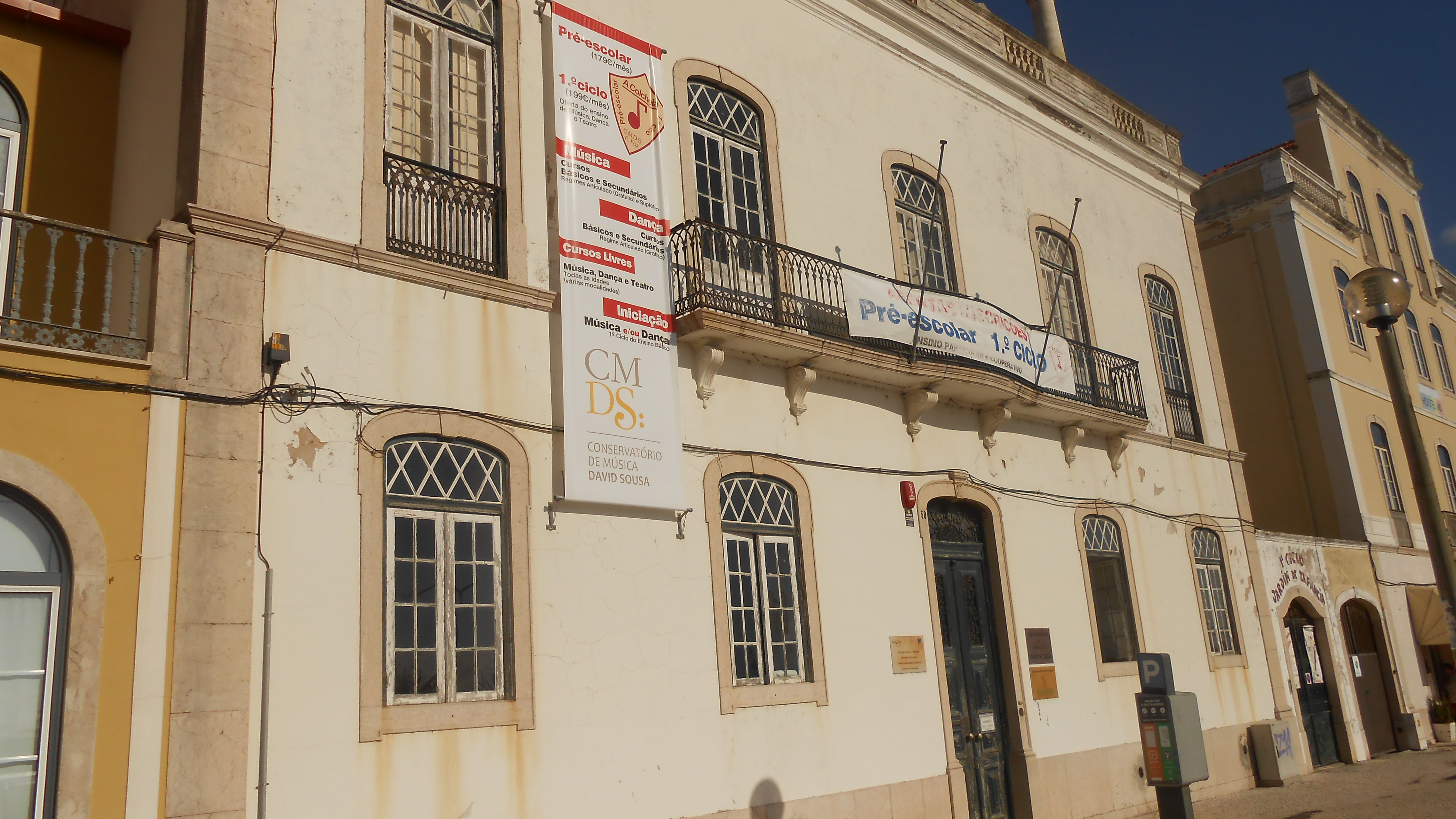 O Conservatório de Música David de Sousa perto do Mercado Municipal da Figueira da Foz.